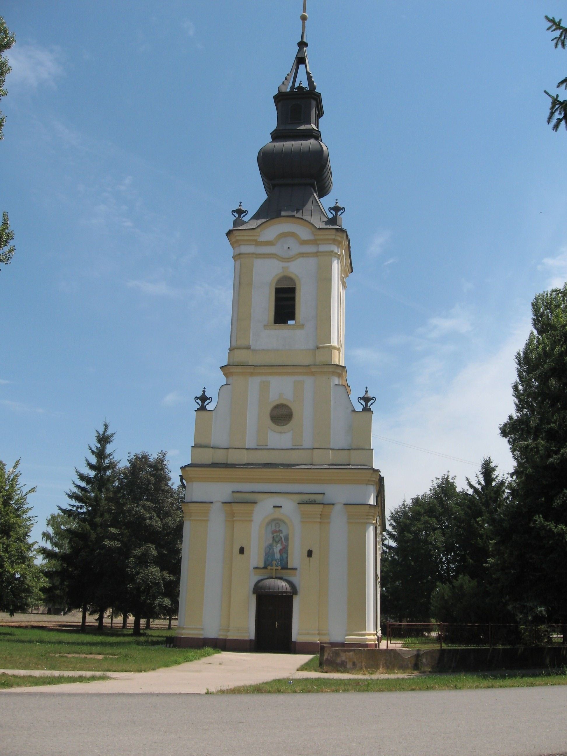 Serbian Orthodox Church in Jamena, Serbia, Vojvodina/L'église orthodoxe serbe de Jamena, Serbie, Voïvodine